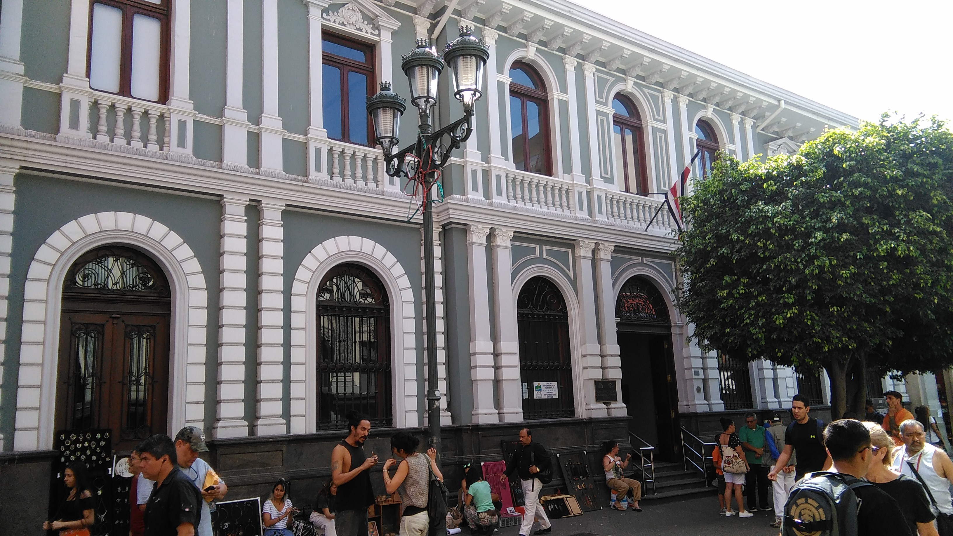 Edificio del Antiguo Banco Anglo situado en la Avenida Central de la ciudad de San José.